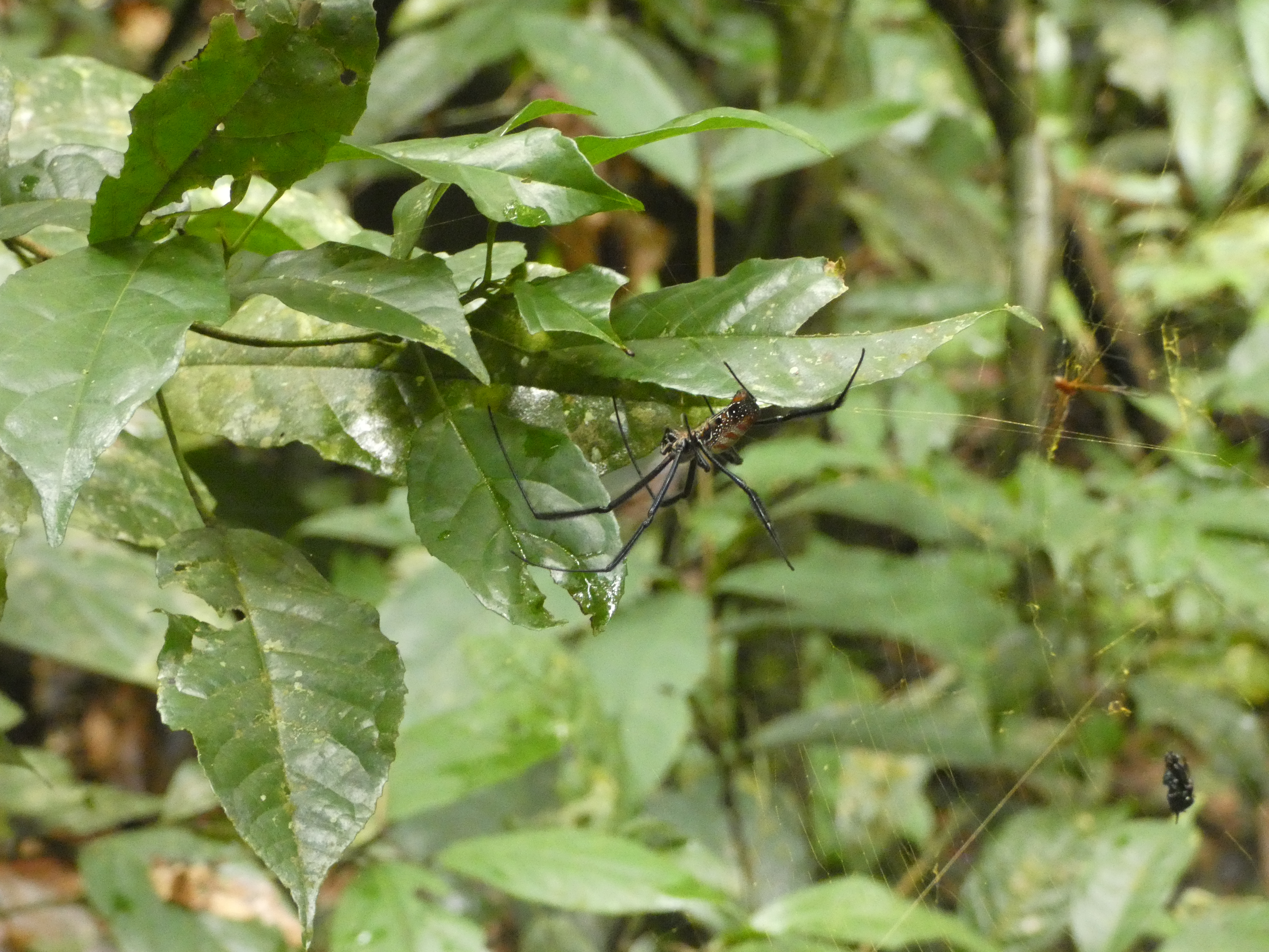 Spinne der Gattung Nephila im Nationalpark Tai